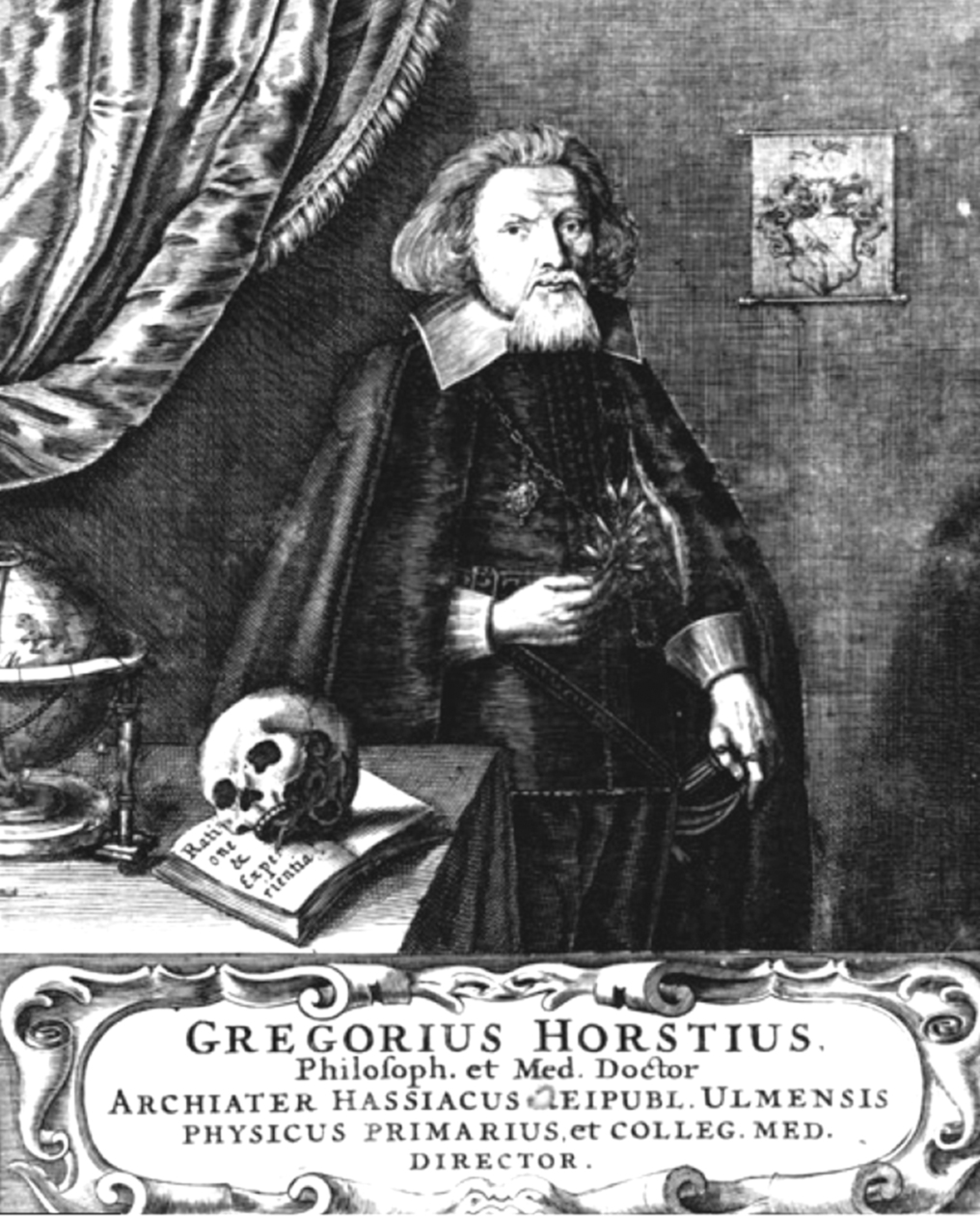 Porträt-Kupferstich des Anatomen Gregor Horstius (1578–1636)